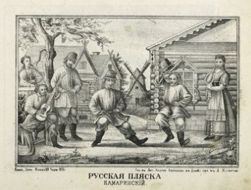 Русская пляска «Камаринский». Лубок